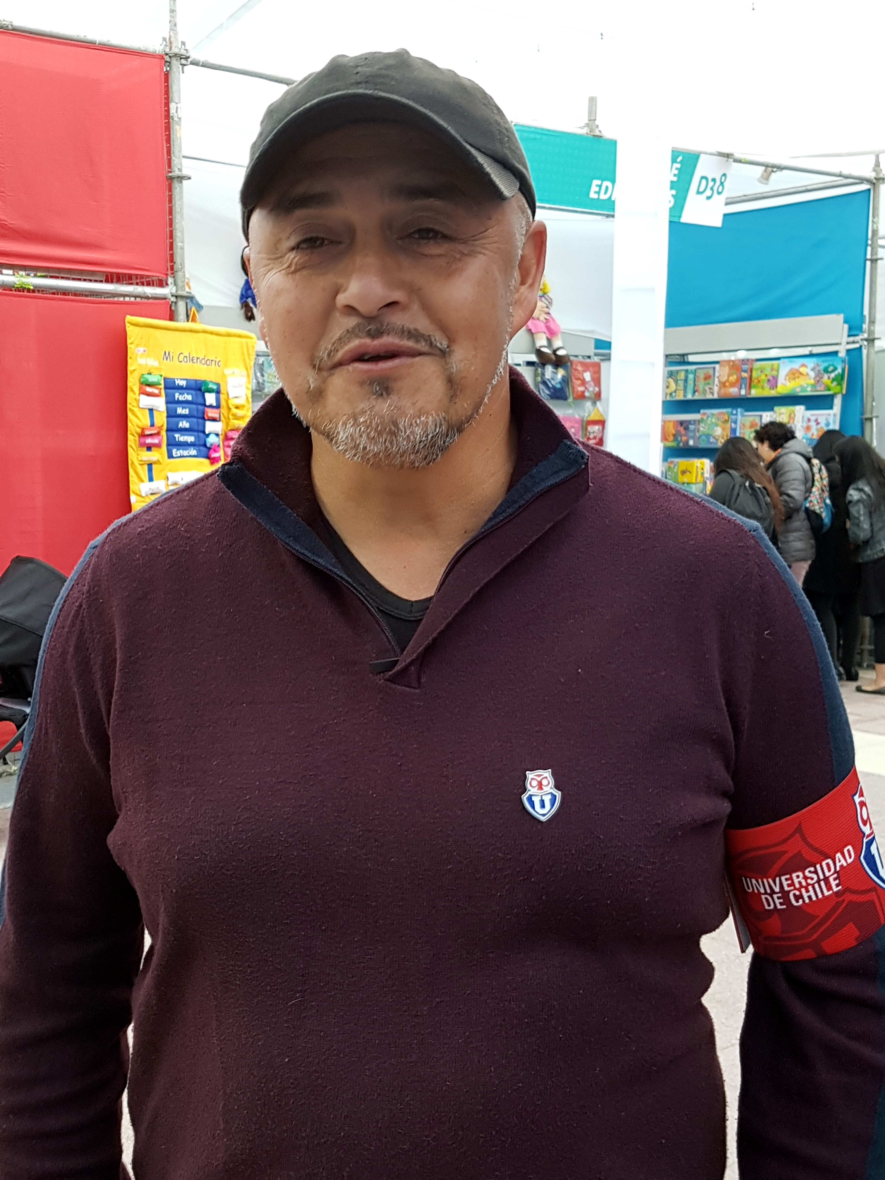 El entrenador chileno de fútbol Luis Musrri en la Feria Internacional del Libro de Santiago 2017.